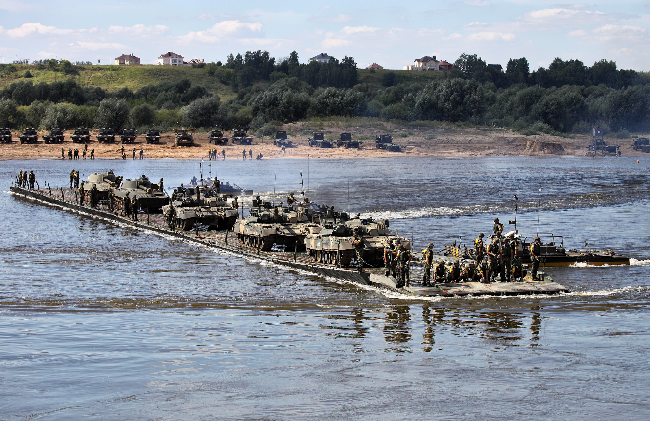 Ротный паром команды Сербии и перевозка танков Т-80У и САУ 2С1 Гвоздика (Serbian team pontoon ferry for T-80U and 2S1 Gvozdika)